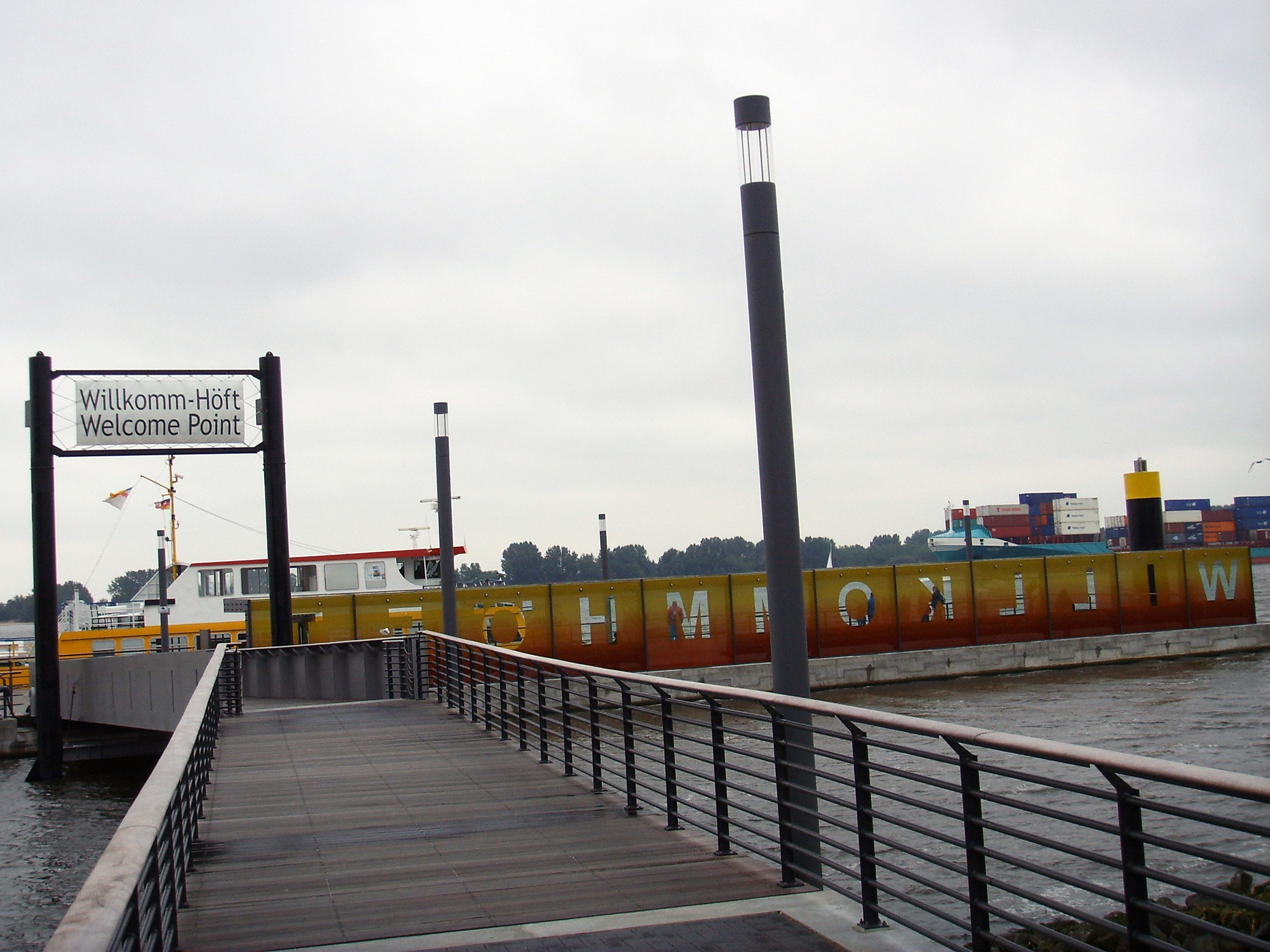 Schiffsbegrüssungsanlage Willkomm-Höft